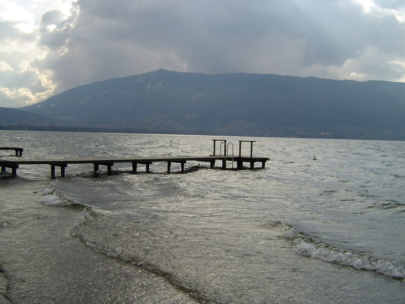 Le Semnoz vu de Menthon-Saint-Bernard.